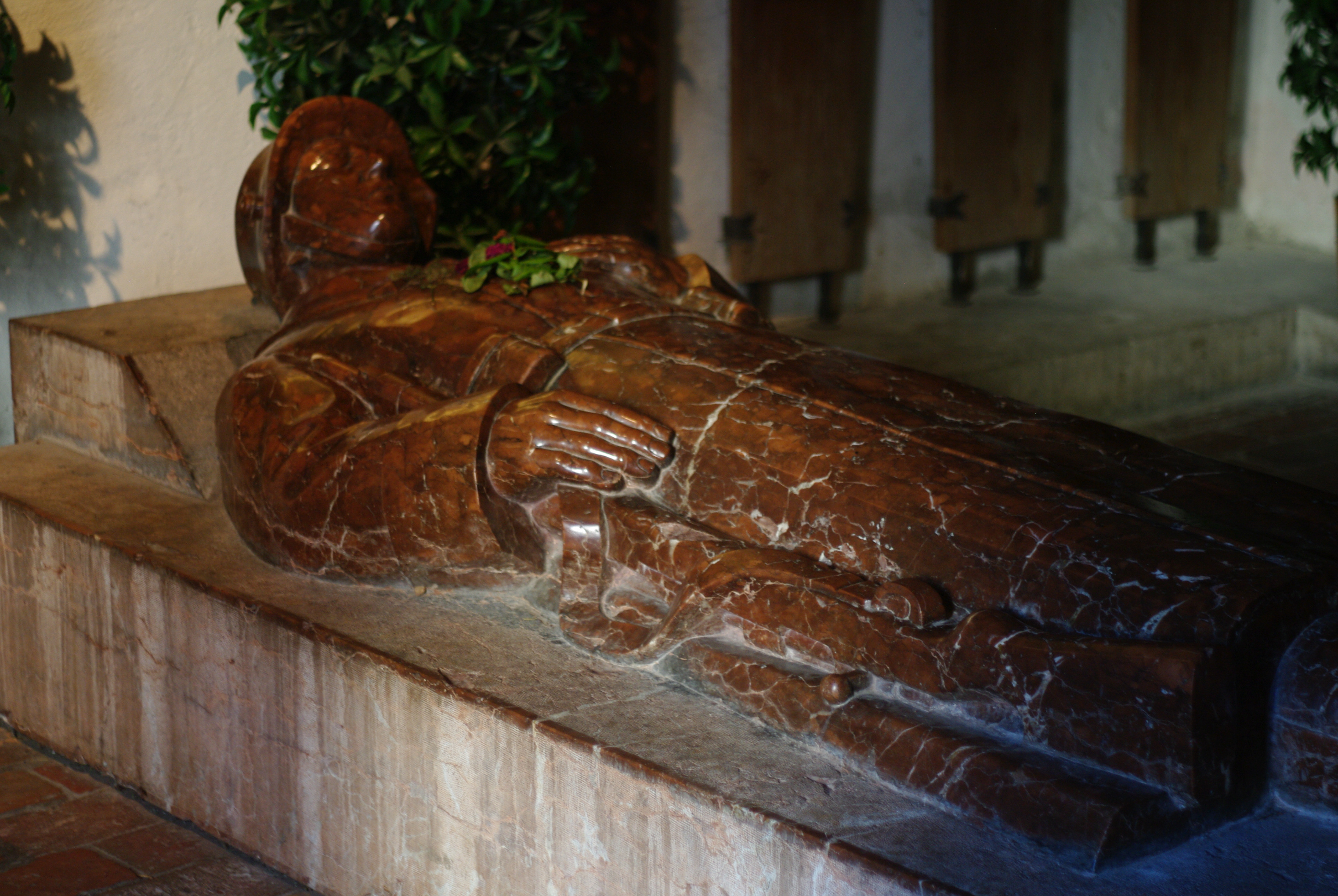 Unbekannter Soldat, Marie Feulner, 1928